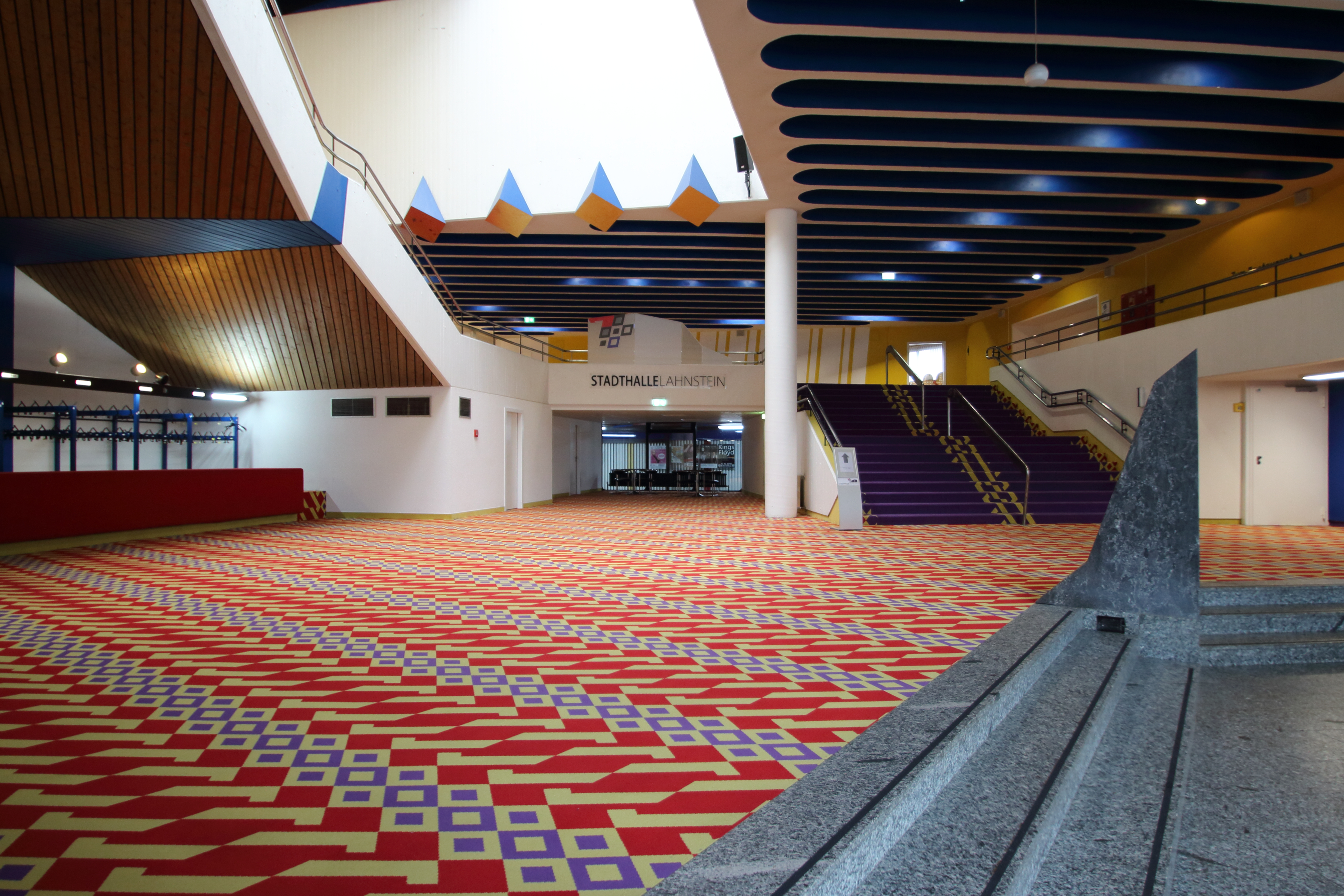 Stadthalle Lahnstein in Oberlahnstein. Sichtbetonbau, Eröffnung am 24. Mai 1973. Hier: Foyer nach originalgetreuer Renovierung im Jahr 2010. Tag des offenen Denkmals 2019.